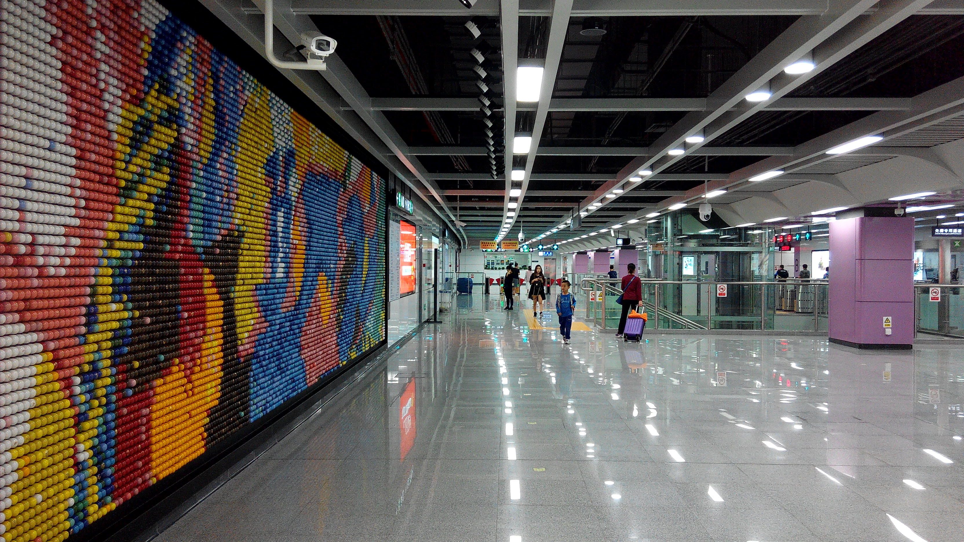 深圳地铁9号线 文锦站站厅